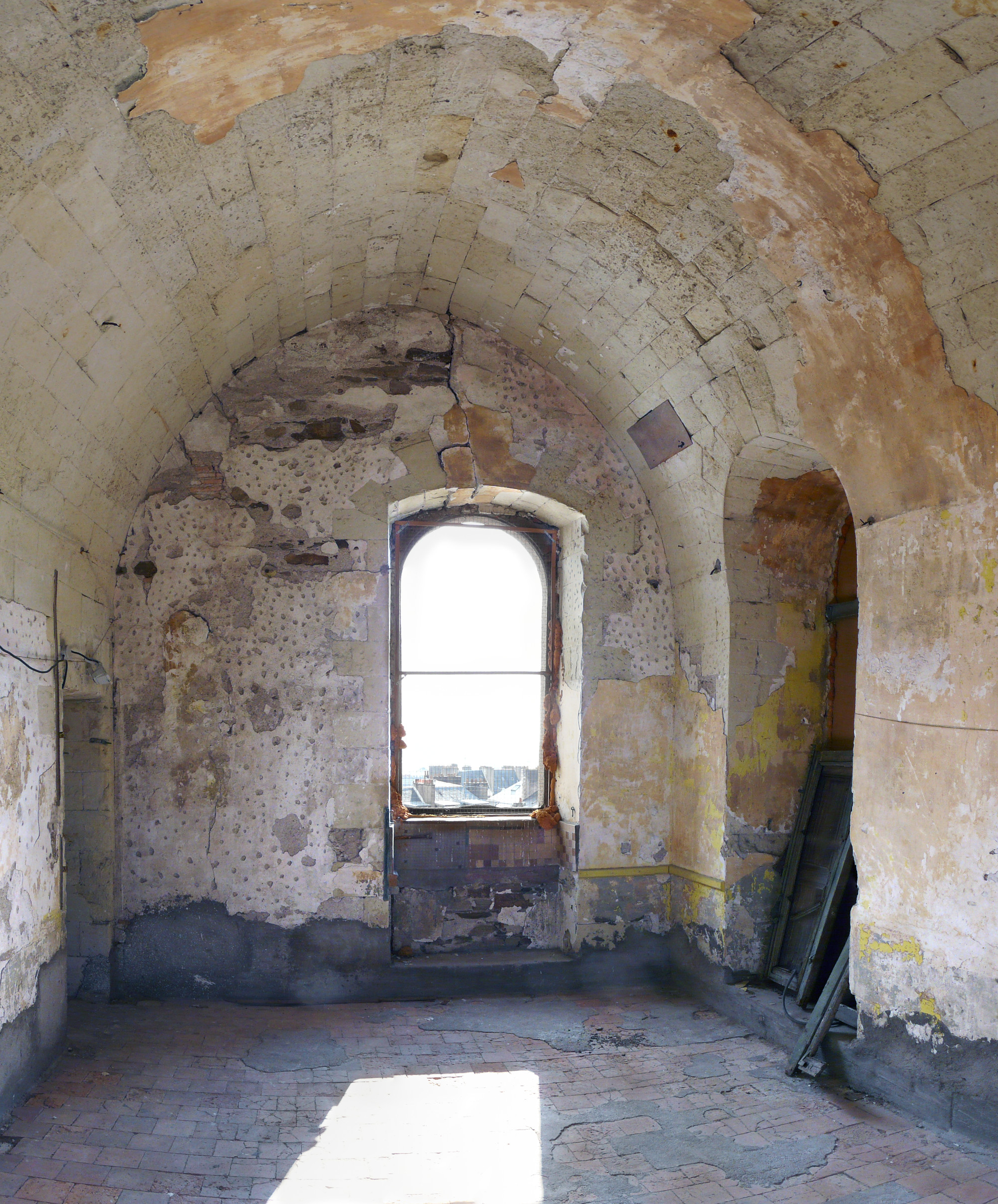 Ancien observatoire de la Marine - Nantes - Cabinet des montres. C'est dans cette pièce au quatrième étage qu'étaient réglés les chronomètres de marine. À la fenêtre du côté Sud se trouvait une lunette méridienne qui par l'observation régulière de certaines étoiles permettait d'obtenir une heure précise pour le réglage des chronomètres. Les troisième et quatrièmes étages de la tour sont voûtés afin d'atténuer toute source de vibrations, permettant de cette manière d'assurer une précision indispensable dans le réglage des instruments et pour les observations astronomiques. Le dallage au sol renforce cette stabilité. .